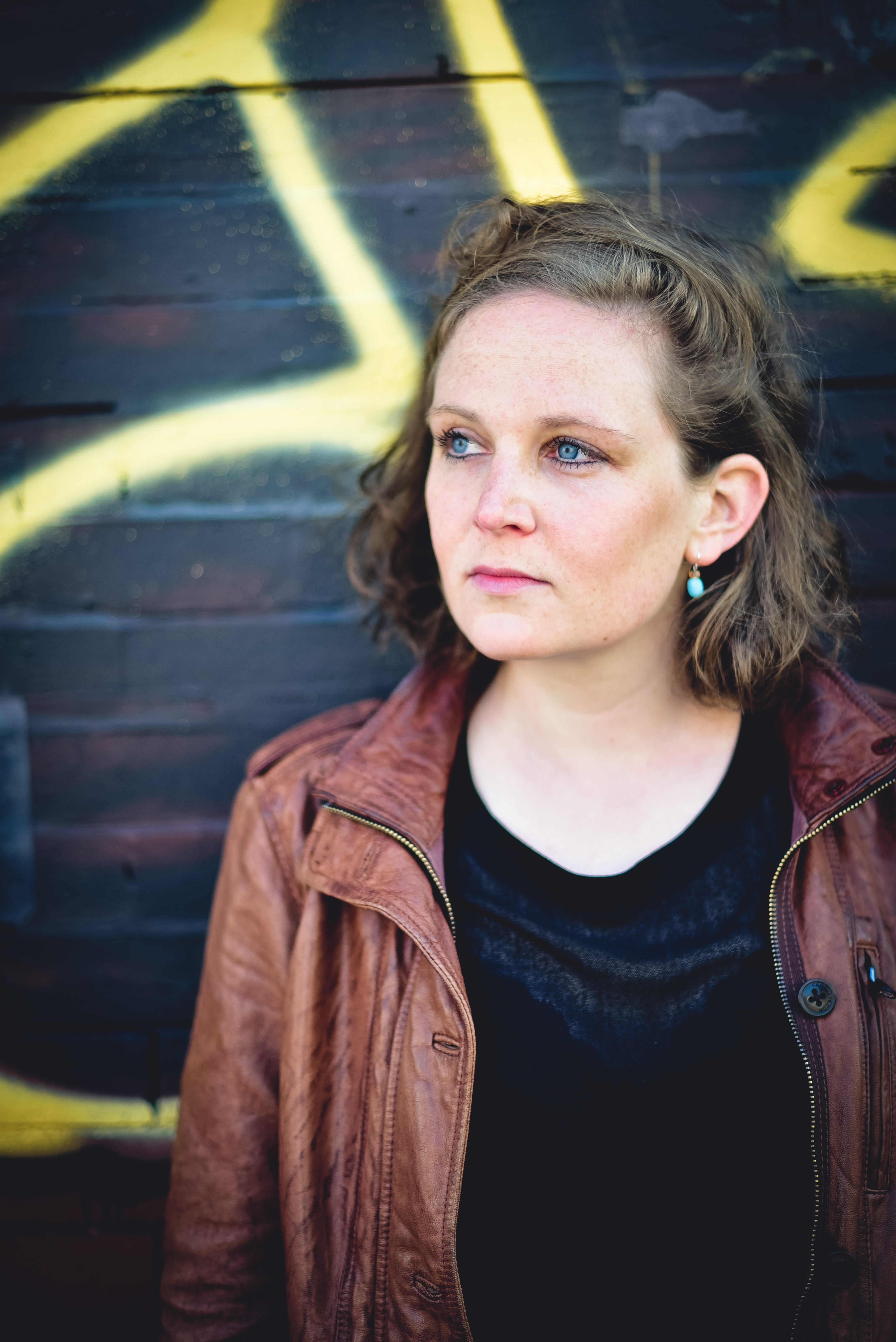 by Sally Lazic